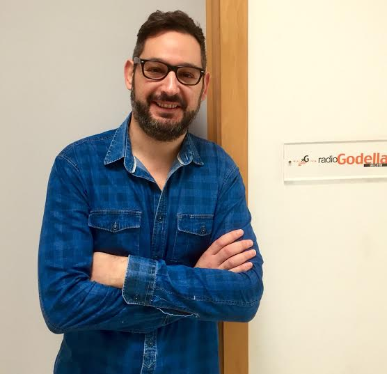 Eugeni Alemany als estudis de La Represa